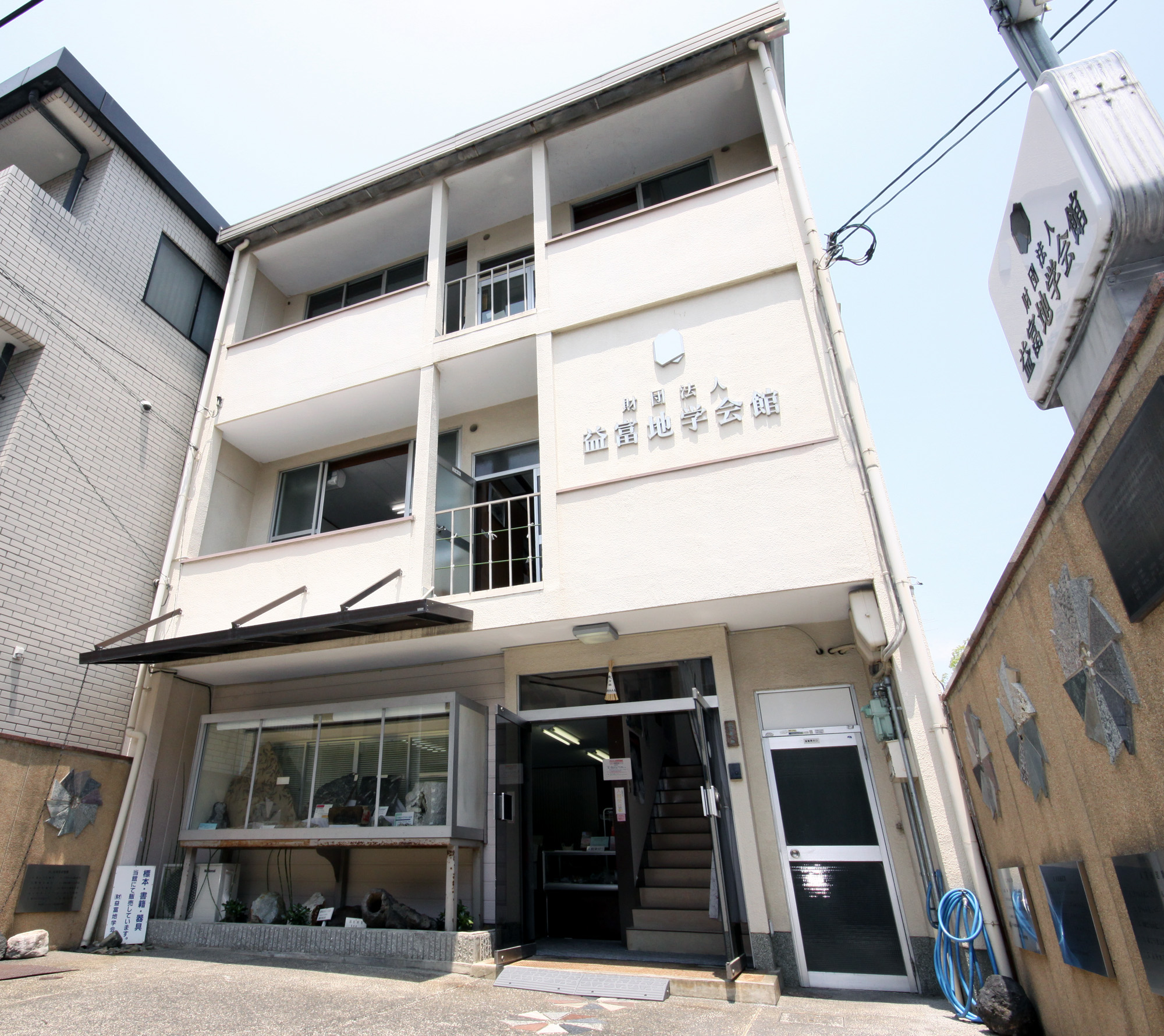 益富地学会館の外観